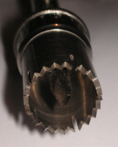 Stirnseite eines Trepanbohrers